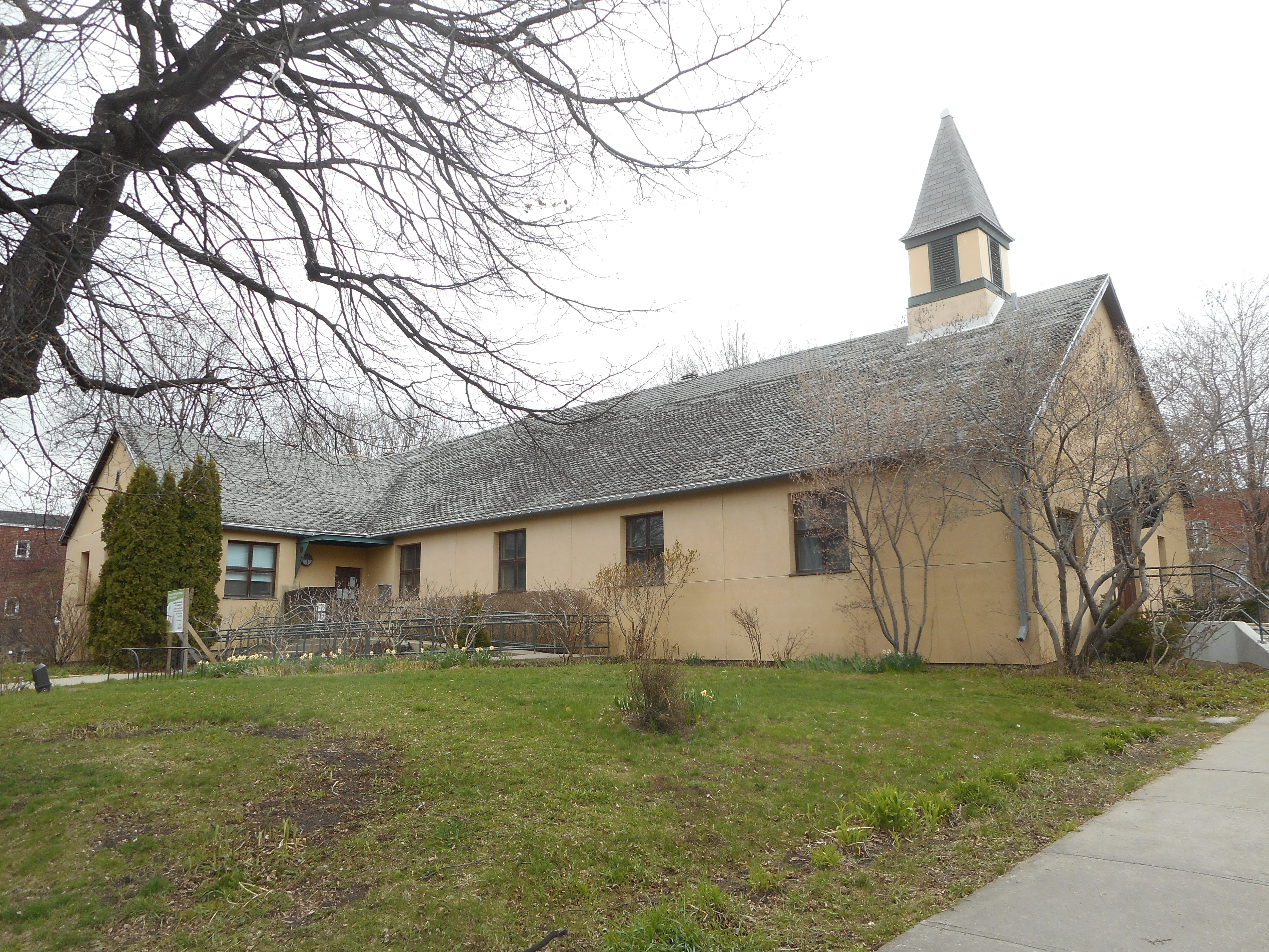 De 1956 à 2015, la bibliothèque Benny était située au 3465, avenue Benny, dans la chapelle Sainte-Monica construite en 1900. Depuis 2016, la bibliothèque Benny loge dans le Centre culturel de Notre-Dame-de-Grâce.